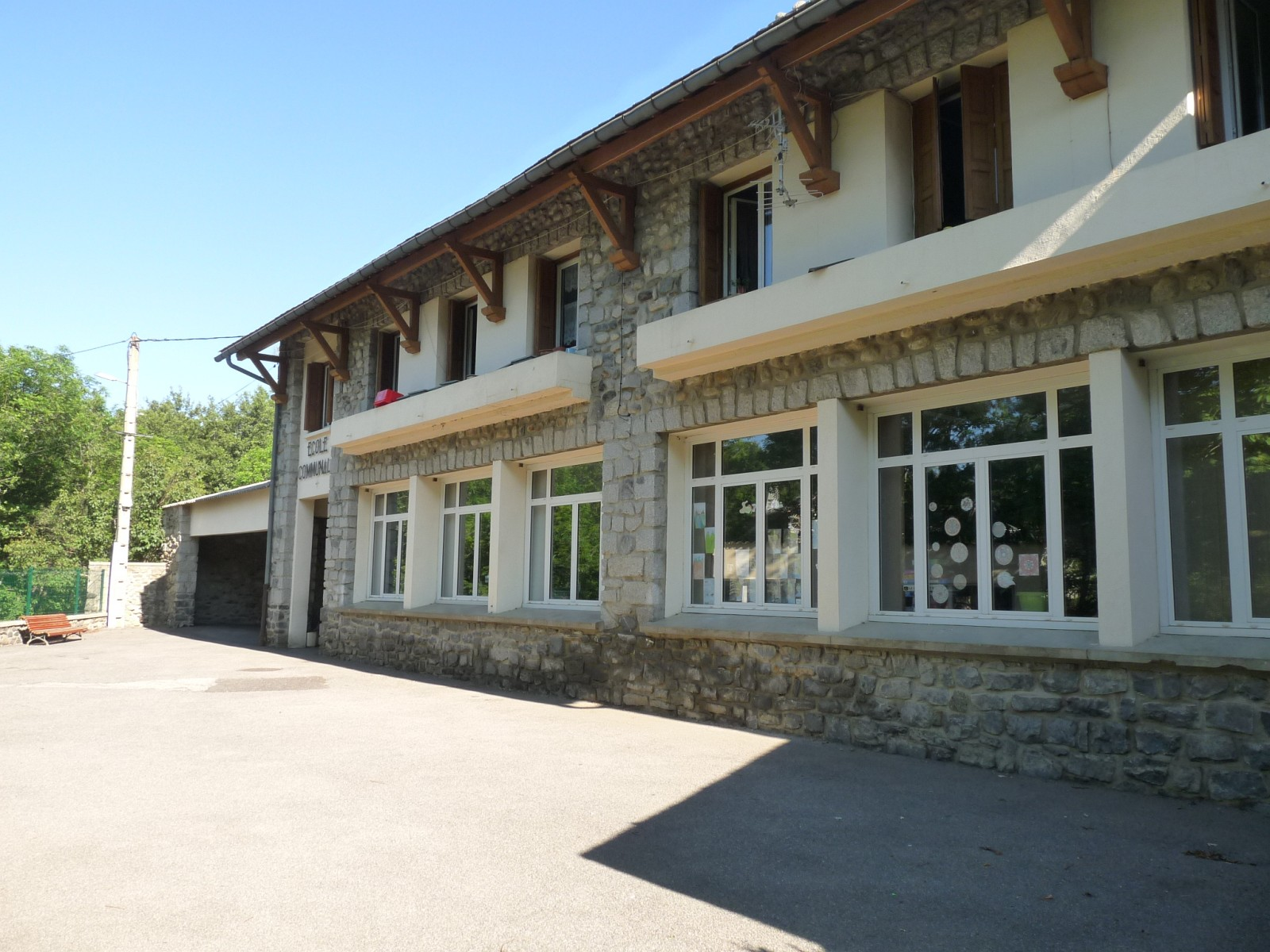 Ecole d'Ur, Pyrénées-Orientales, France